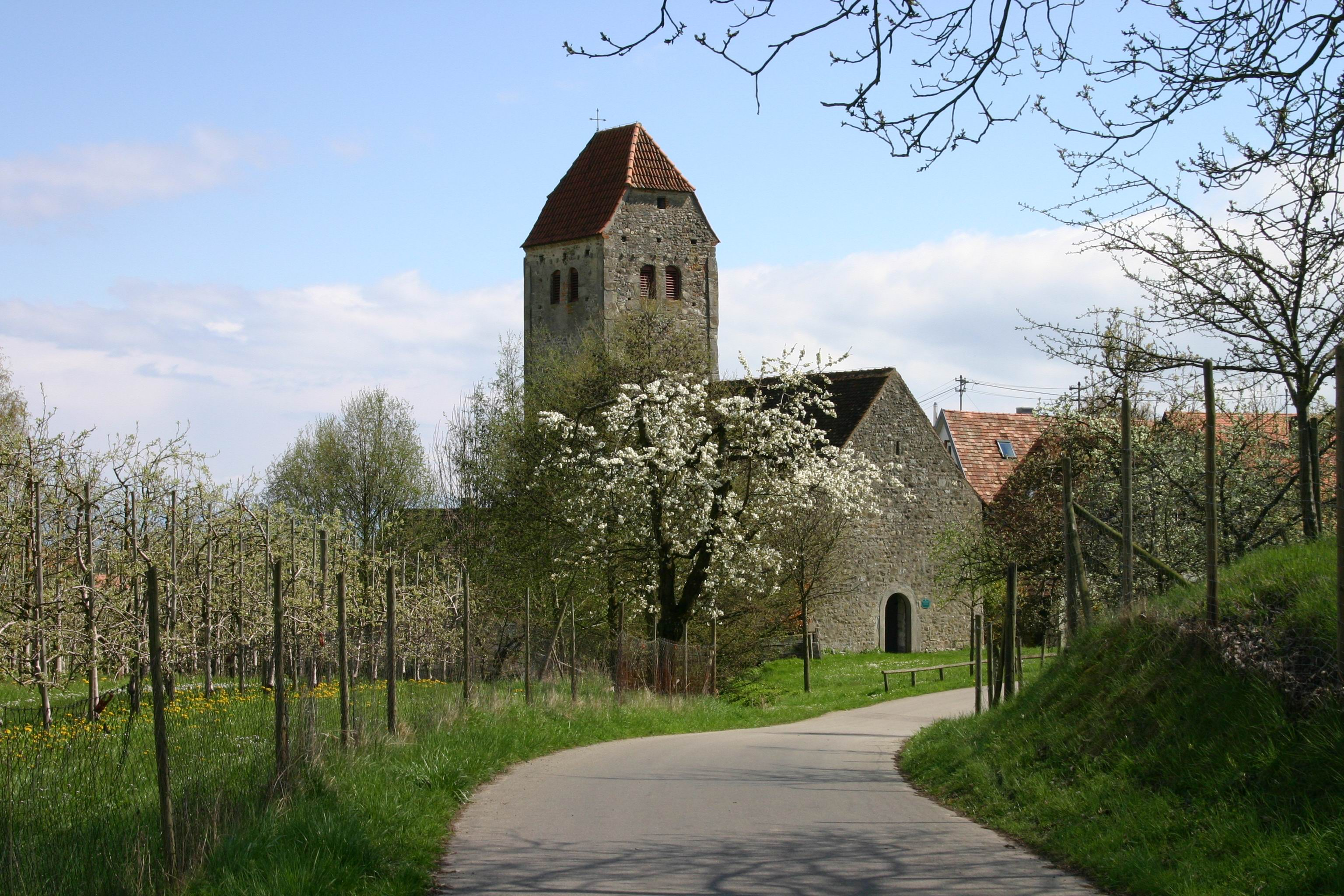 Romanische Kirche St. Oswald und St. Otmar, Immenstaad-Frenkenbach, 12. Jhd.